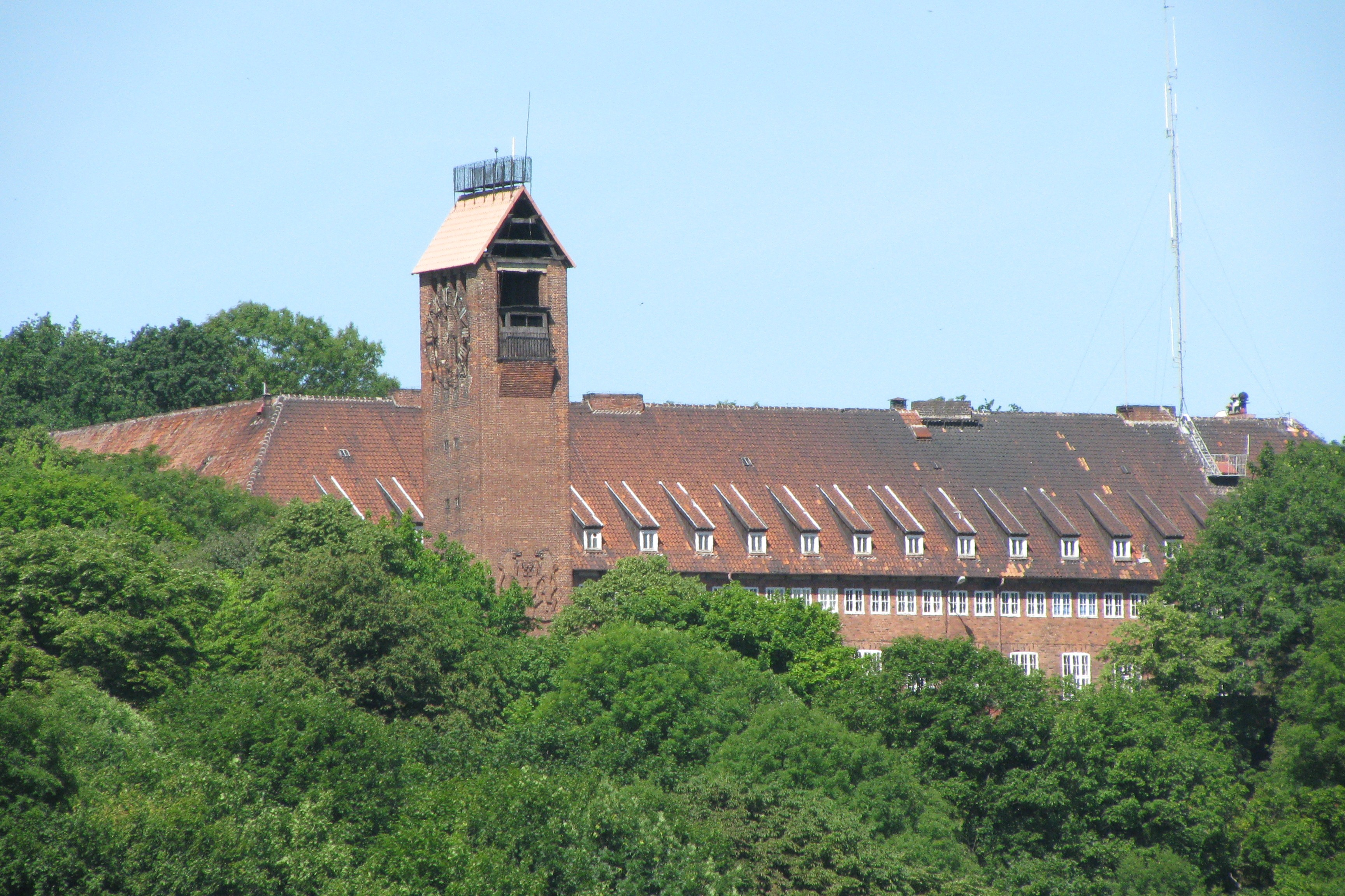 Biskupia Górka w Gdańsku - schronisko z 1939.